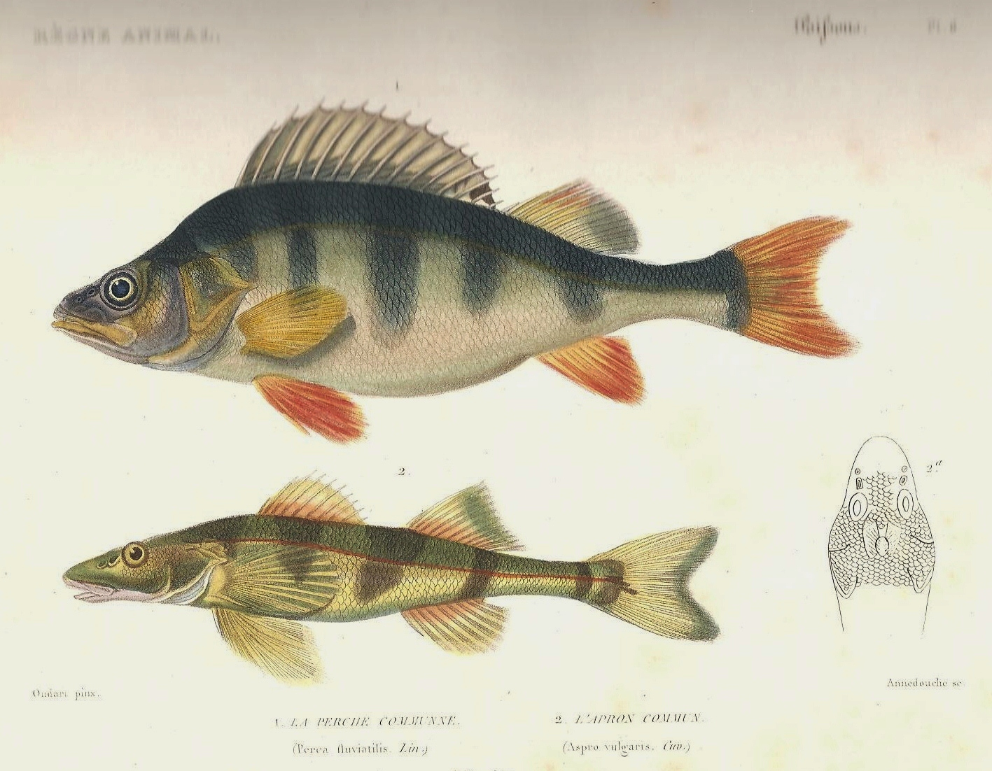 Perca fluviatilis and Zingel asper syn. Aspro vulgaris En haut Perche commune et en bas Apron du Rhône dessinés par Oudari dans le Règne animal distribué d'après son organisation par Georges Cuvier, deuxième édition (1828).